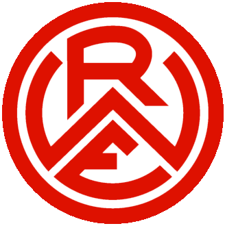 Logo del Rot-Weiss Essen